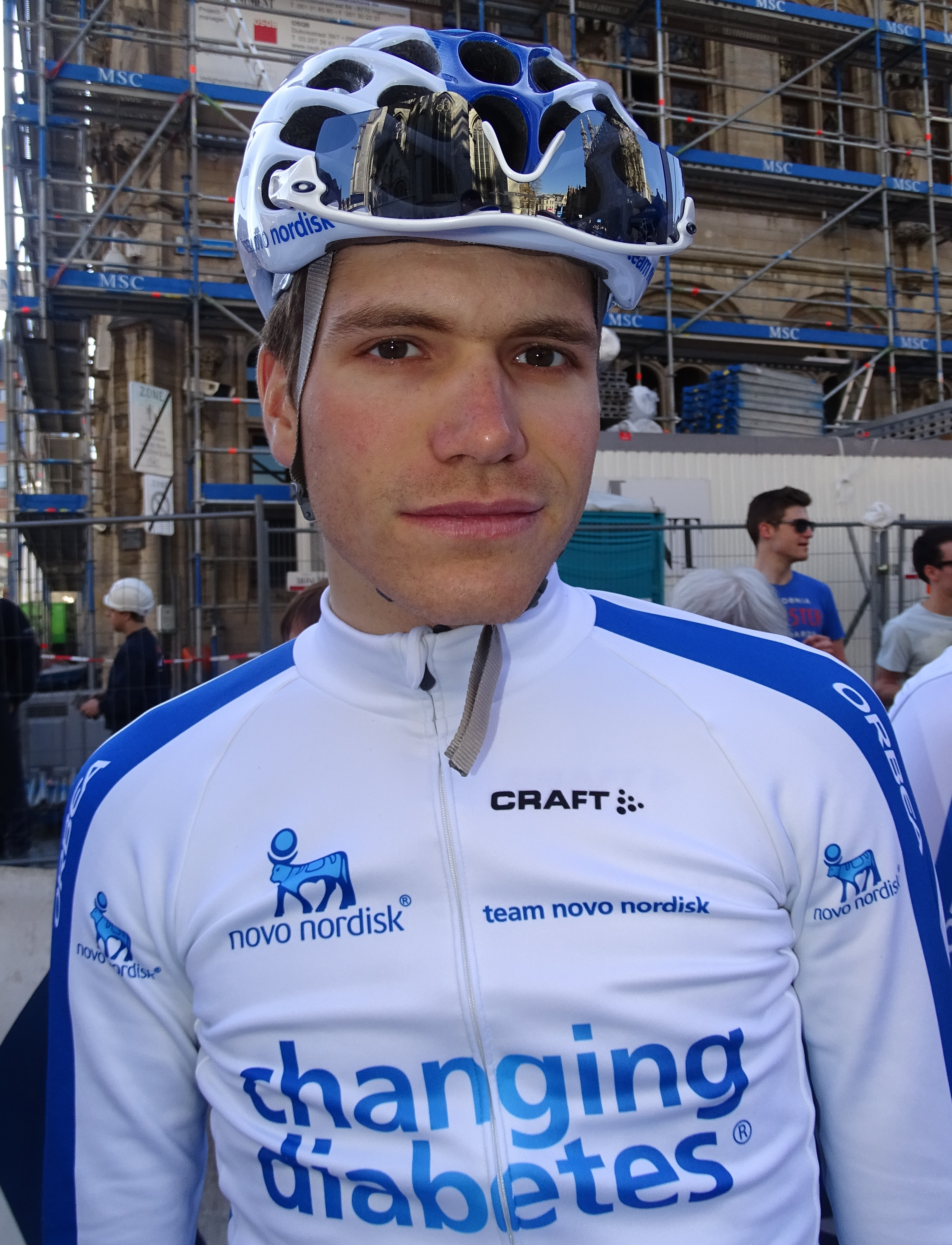 Reportage réalisé le mercredi 15 avril à l'occasion du départ de la Flèche brabançonne 2015 à Louvain, Belgique.